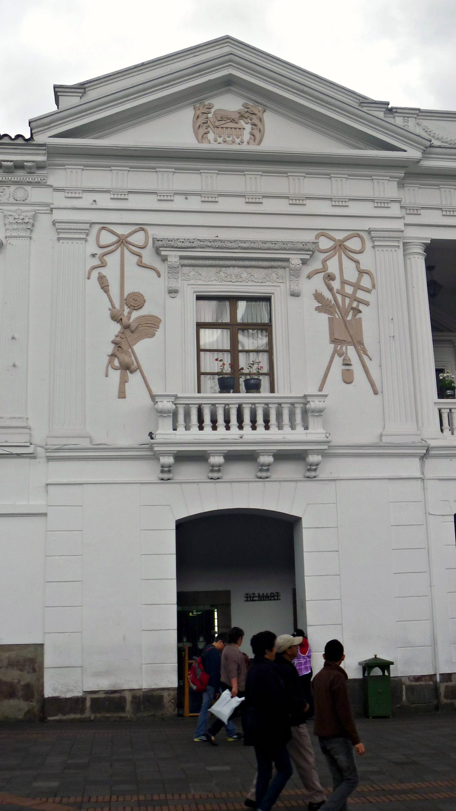 Detalle del resalto occidental del Palacio Arzobispal de la ciudad de Quito DM., con las armas del Vaticano en sobre-relieve.